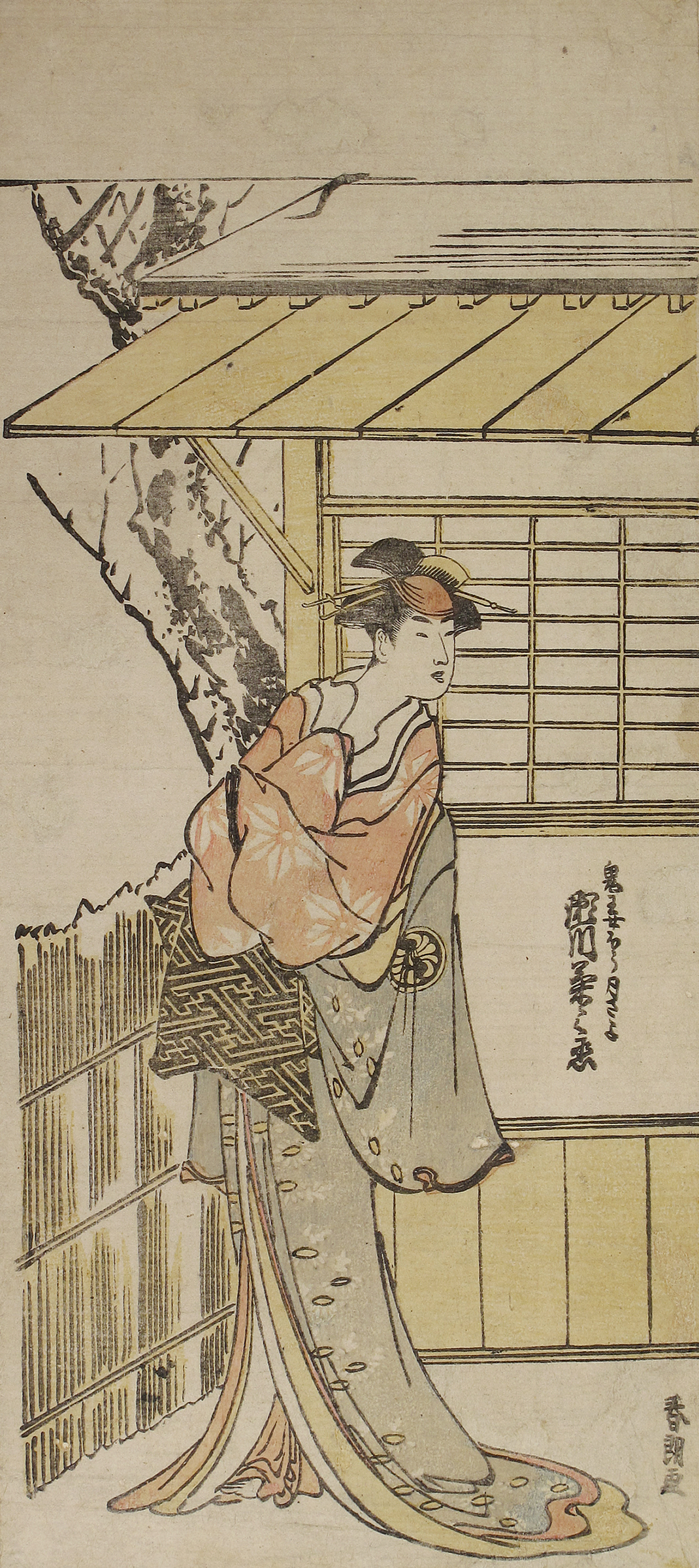 安永８年（1779年）瀬川菊之丞の図 画号 デビュー作の版画とさる。